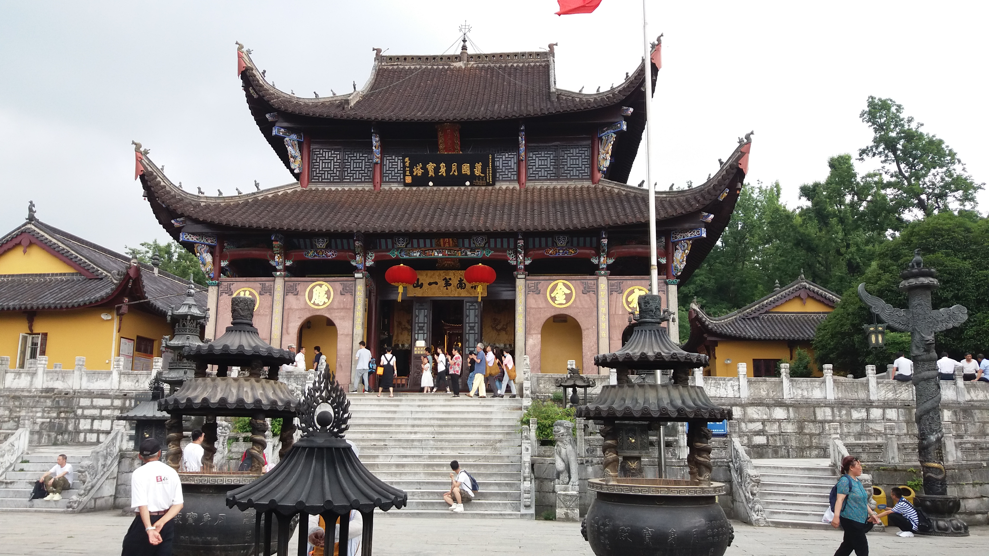 金地藏肉身殿，月身宝殿，老爷顶